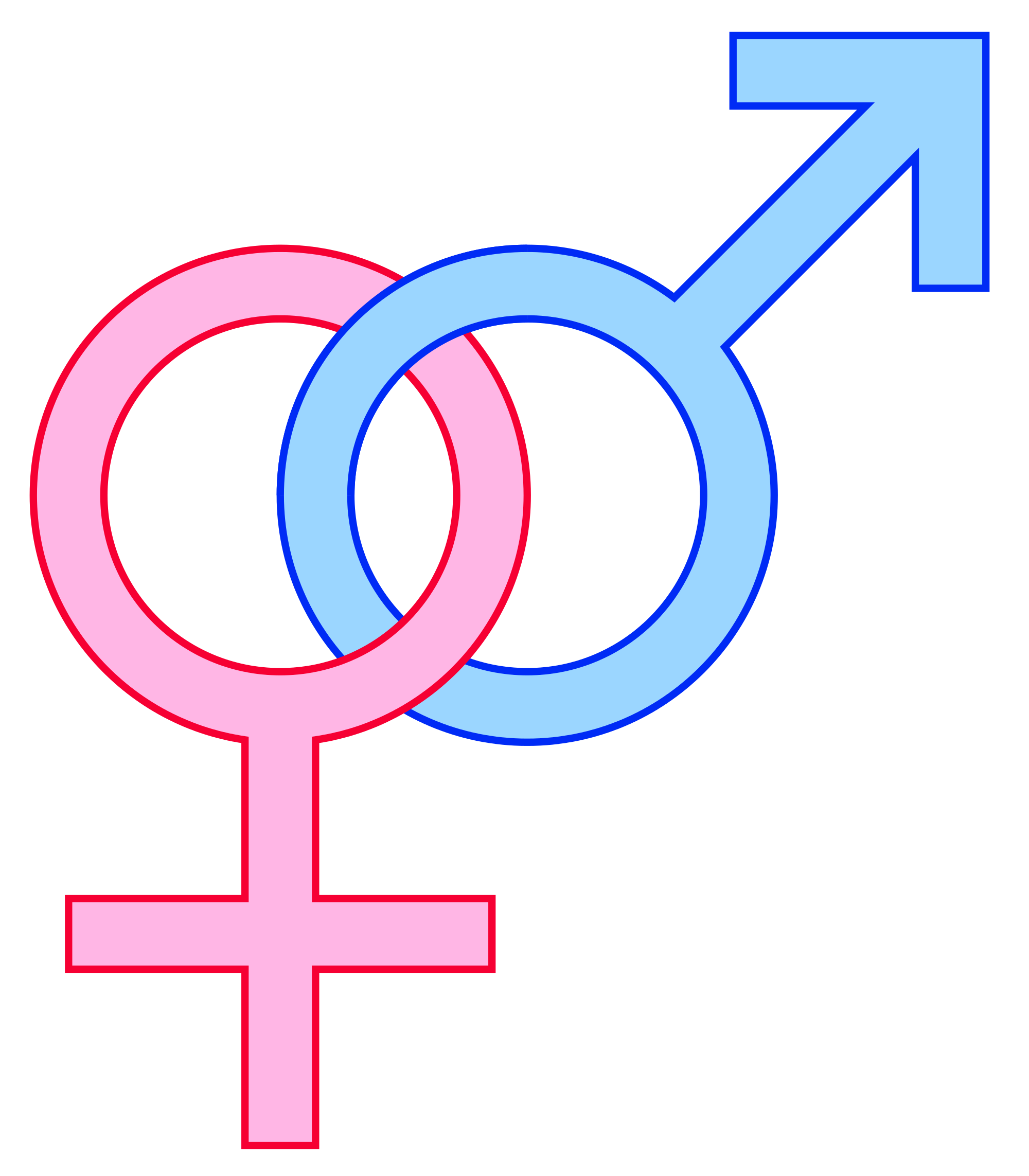 გენდერის სიმბოლო. წითელი არის ქალის - ვენუსის სიმბოლო, ხოლო ლურჯი არის მამაკაცის - მარსის სიმბოლო.